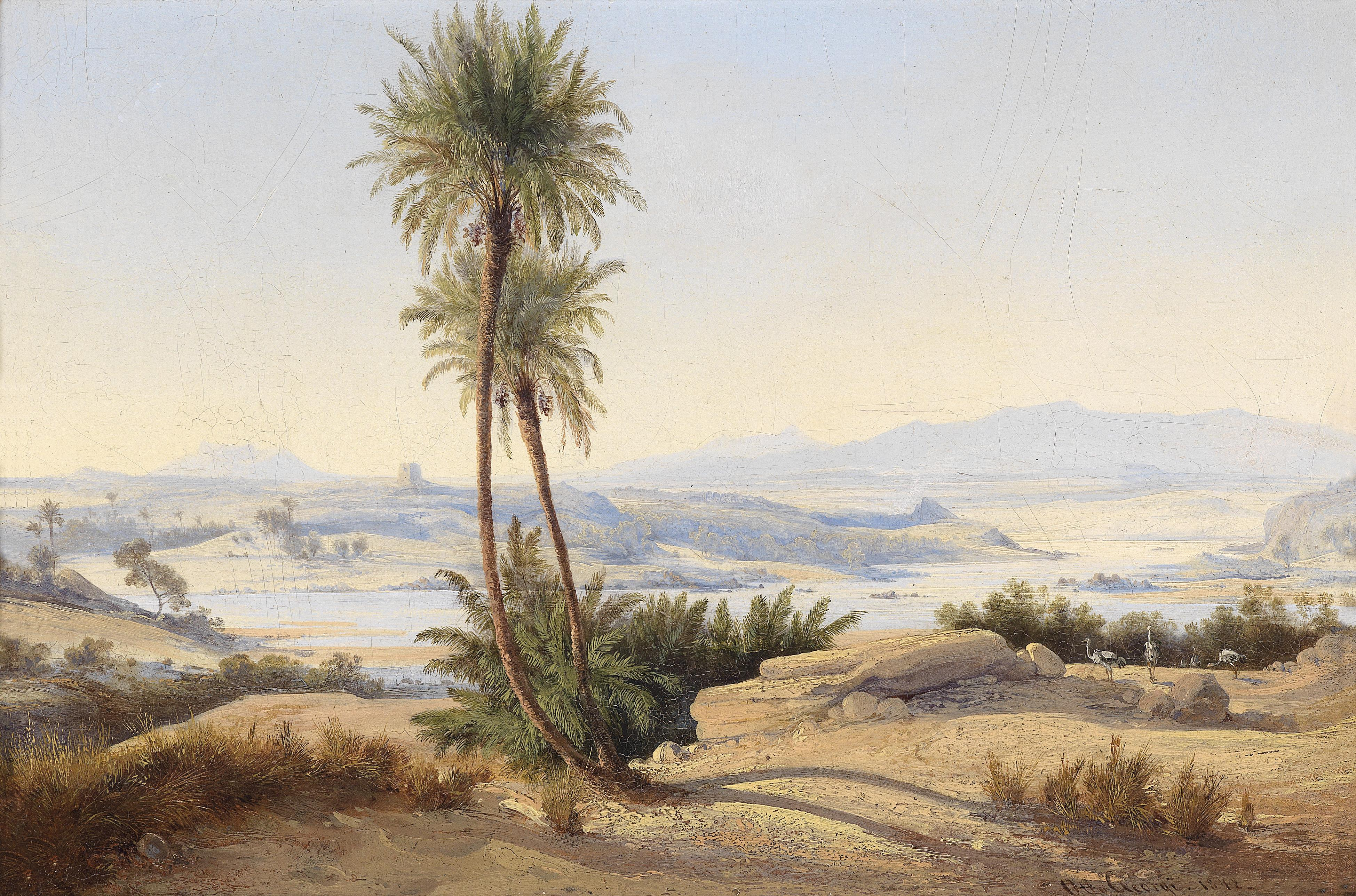 "Melec el Naser in der Provinz Sukot im südlichen Nubien" laut rückseitiger Bezeichnung, signiert, datiert Otto Georgi 1848, Öl auf Karton, 23 x 34 cm